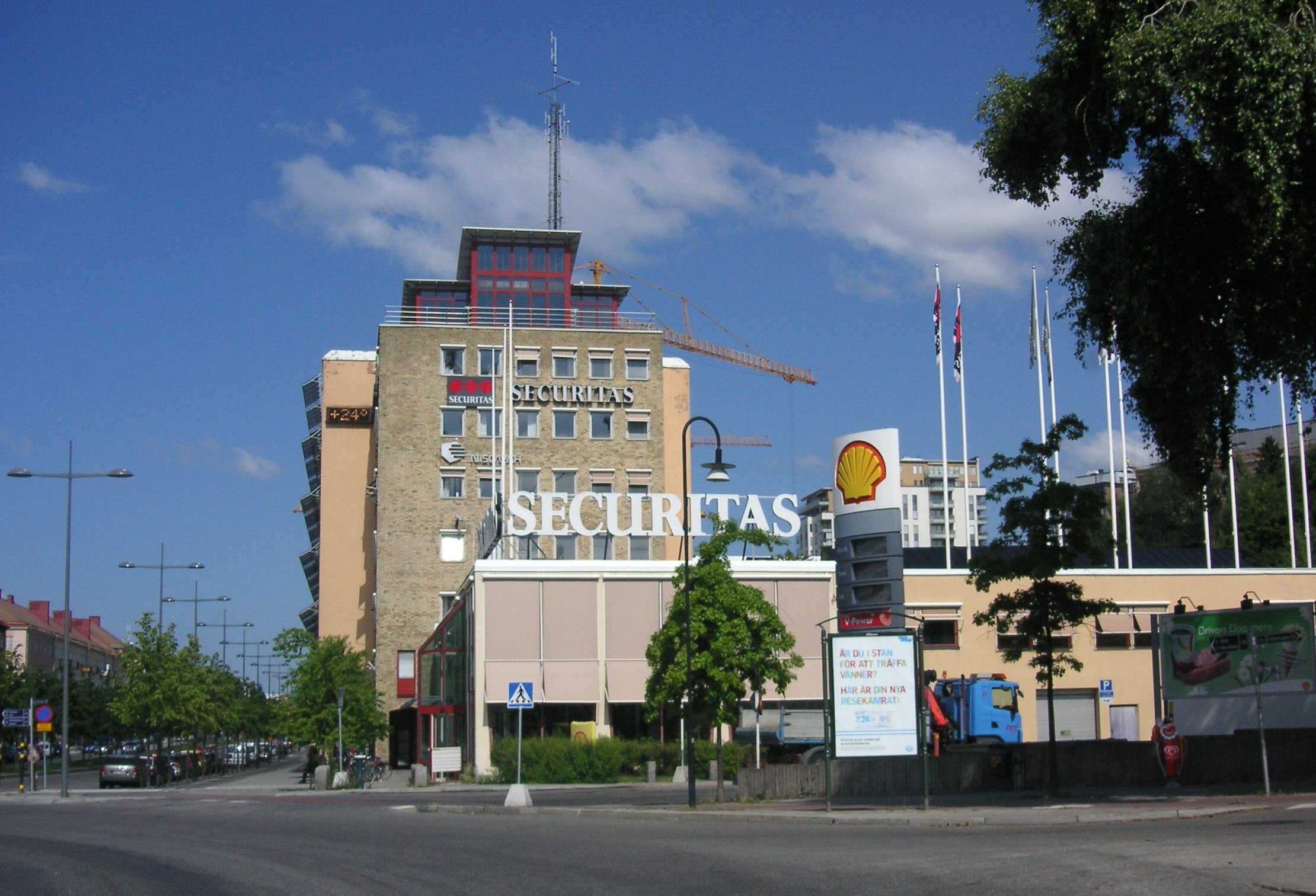 "Securitas-byggnaden" vid Lindhagensplan i Stockholm